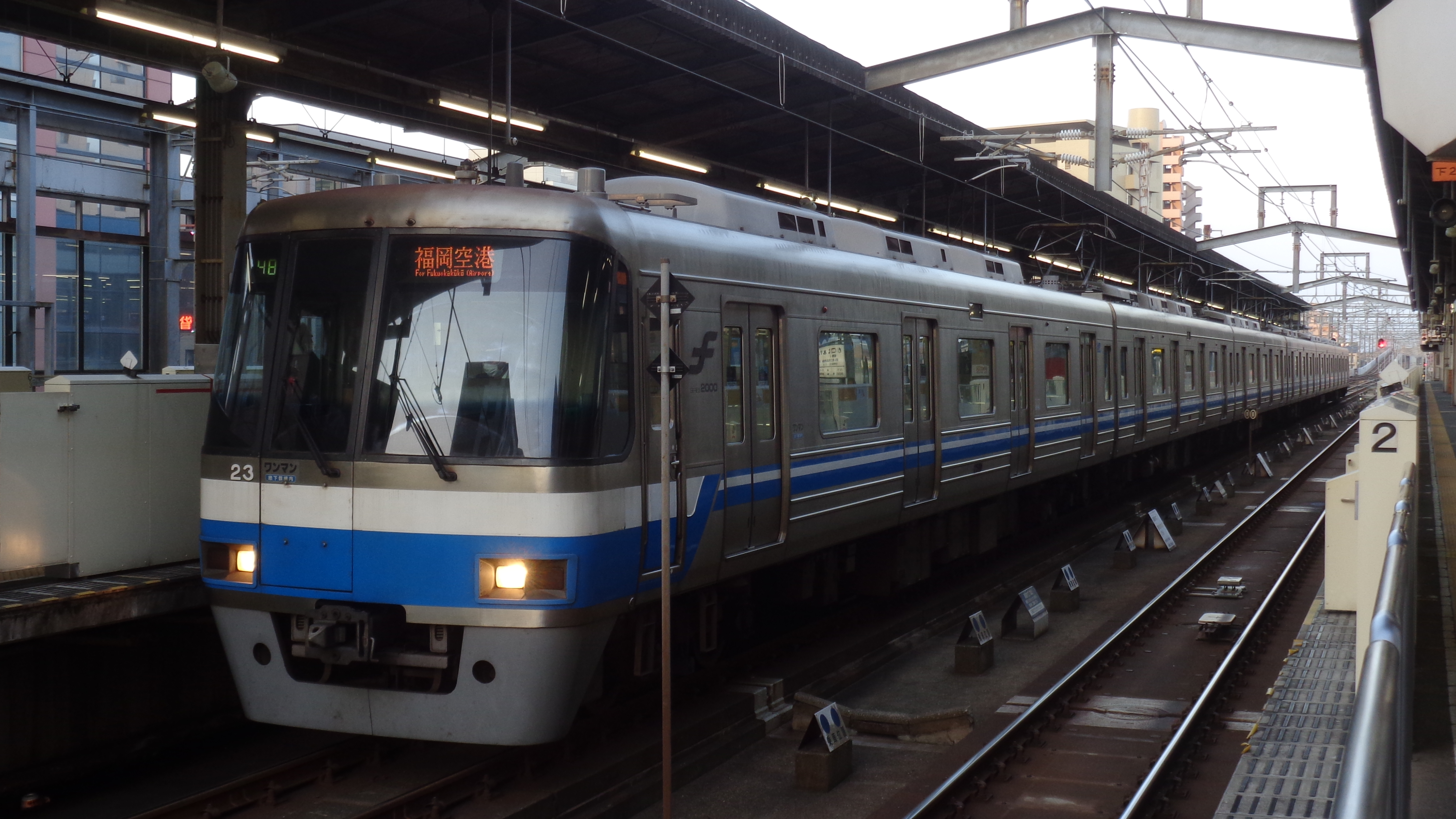 福岡市交通局2000系 第23編成 姪浜駅にて撮影